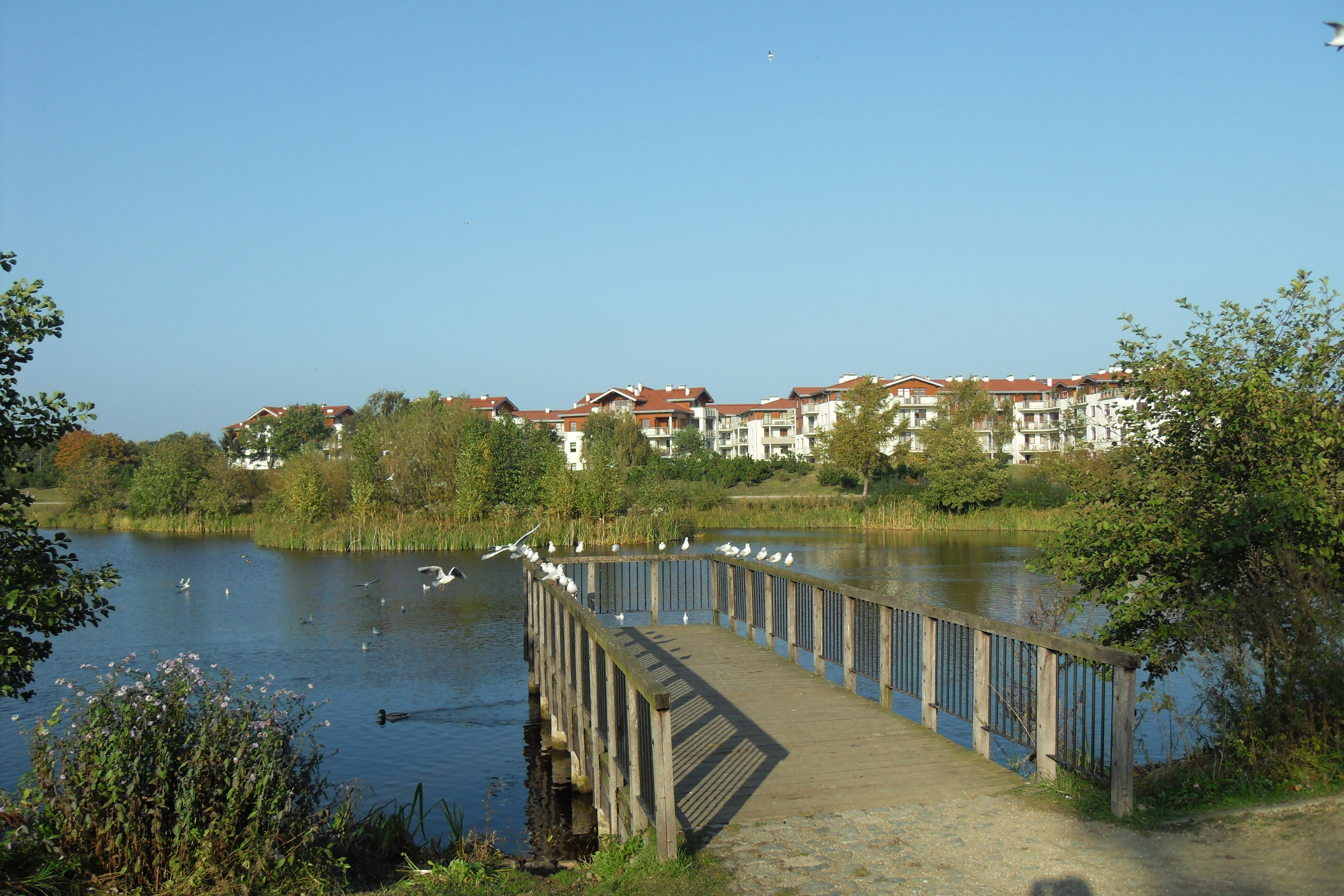 Gdańsk Przymorze. Park im. Ronalda Reagana.